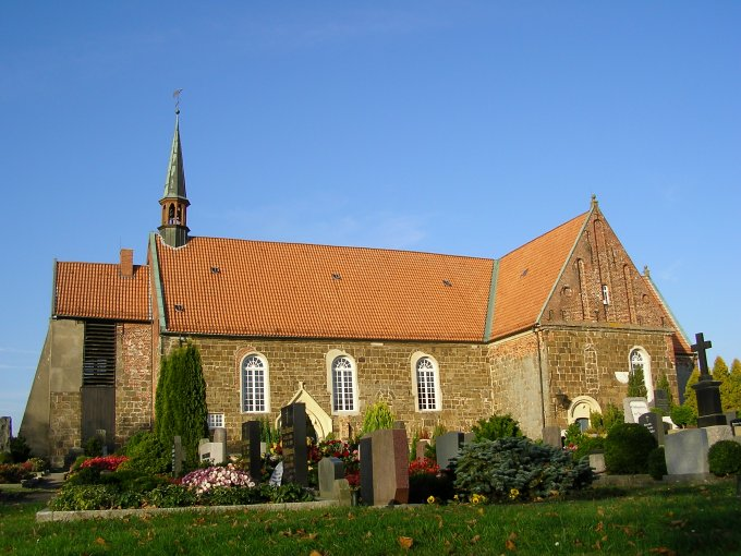 St. Matthäus Kirche in Rodenkirchen (Stadland)